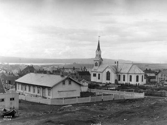 Gamle Vardø kyrkje (1869-andre verdskrig} Arkitekt: Chr. H. Grosch